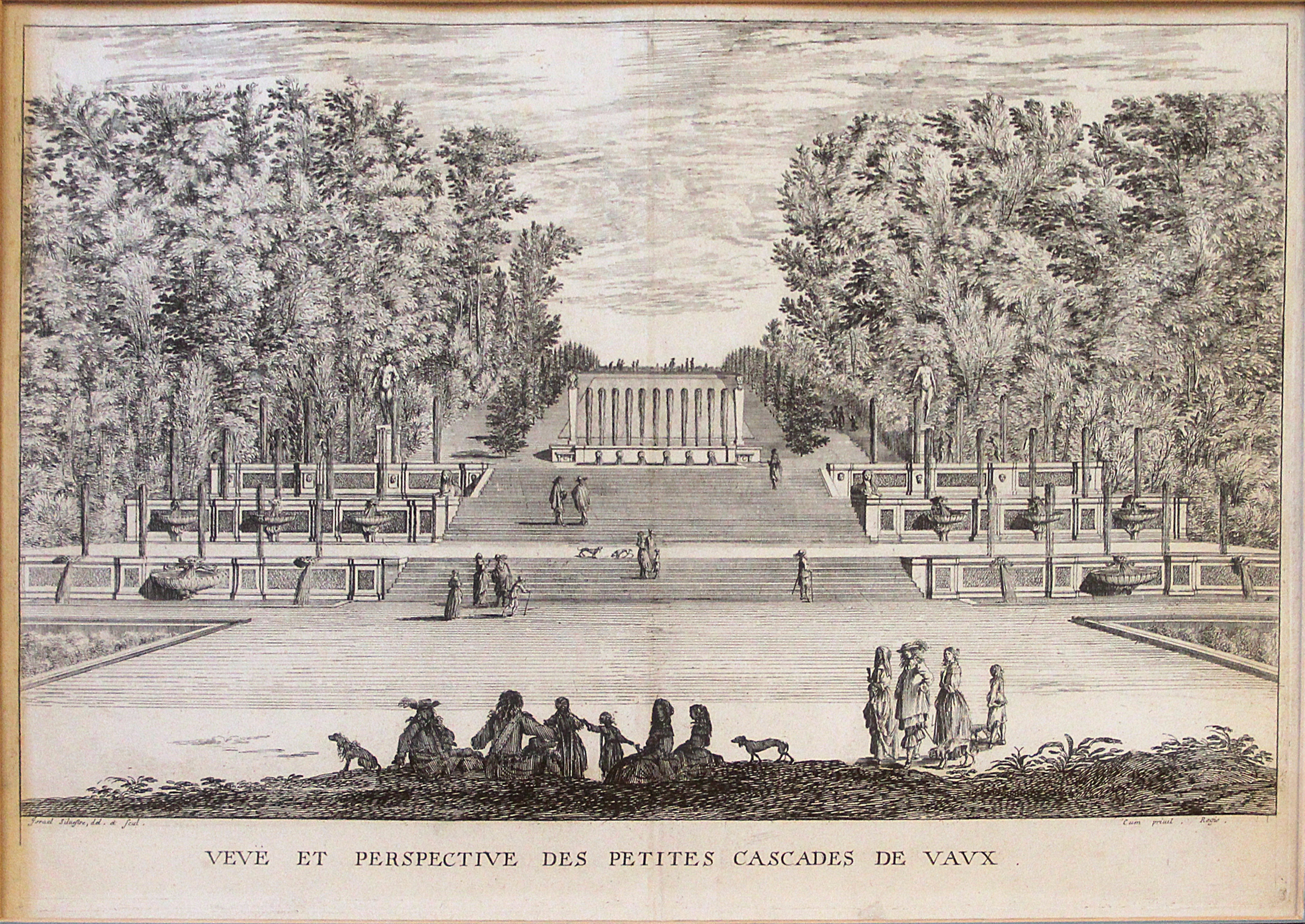 Gravure « VEVE ET PERSPECTIVE DES PETITES CASCADES DE VAVX » réalisée avant 1656 par Israël Silvestre pour Nicolas Fouquet propriétaire du château de Vaux-le-Vicomte - Maincy (Seine-et-Marne, France).